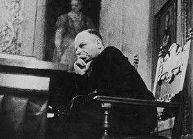 Andrea Fortunato, Pubblico ministero a Verona